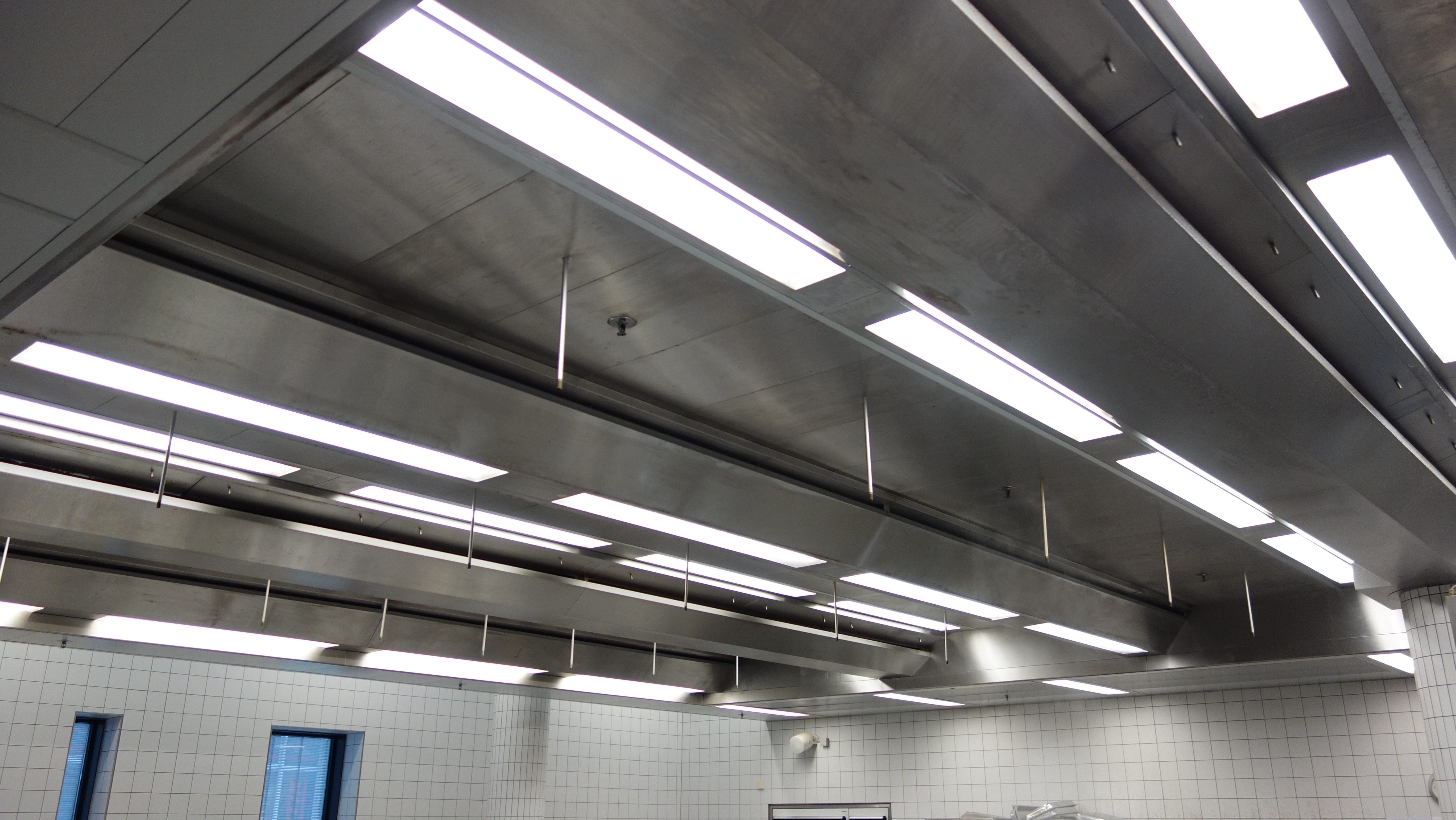 REVEN Induktion Lüftungsdecke mit integriertem Induktionssystem zur kontrollierten Kondensation von Dampf, sowie integrierten Feuchte- und Temperatursensoren zur intelligenten bedarfsgerechten Steuerung der Lüftung und zur vollautomatischen Reinigung und Desinfektion der strömungsoptimierten X-CYCLONE Aerosolabscheider